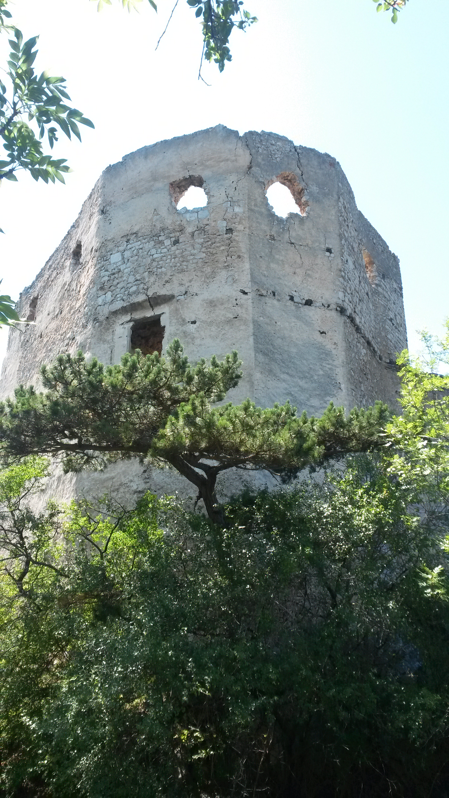 Schildmauer der Hochburg, Ruine Emmerberg, Ansicht aus SO.